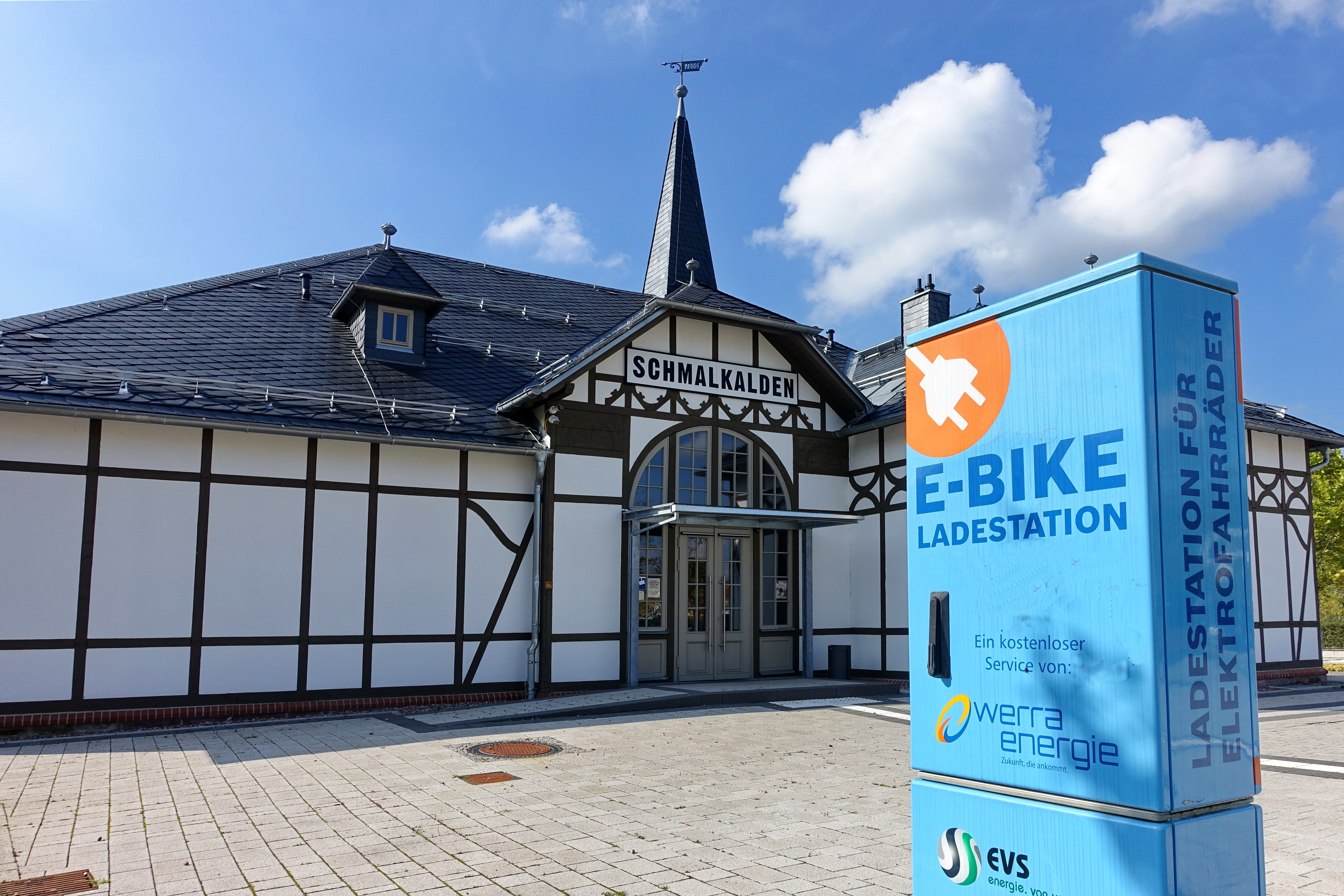 Bahnhof Schmalkalden, Empfangsgebäude